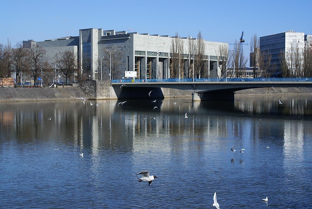 Teren Stare Miasto wraz z zabudową i układem komunikacyjnym oraz zarysem wód w granicach zewnętrznego obrysu pozostałości dawnych fos miejskich i południowych wybrzeży rzeki OdryPomnik Historii – zarządzenie Prezydenta RP z 08-09-1994 r. MP nr 50, poz. 425.„Wrocław – zespół historycznego centrum” Stare i Nowe Miasto oraz wyspy odrzańskie. Granica przebiega: Mostem Uniwersyteckim, ulicami Drobnera, przez pl. Bema, Sienkiewicza, Wyszyńskiego, Mostem Pokoju, Ob. Słowackiego, Krasińskiego, Traugutta, Podwalem, południowym brzegiem Dolnej Odry do Mostu Uniwersyteckiego. Stare Miasto, Miasto Wrocław - Stare Miasto